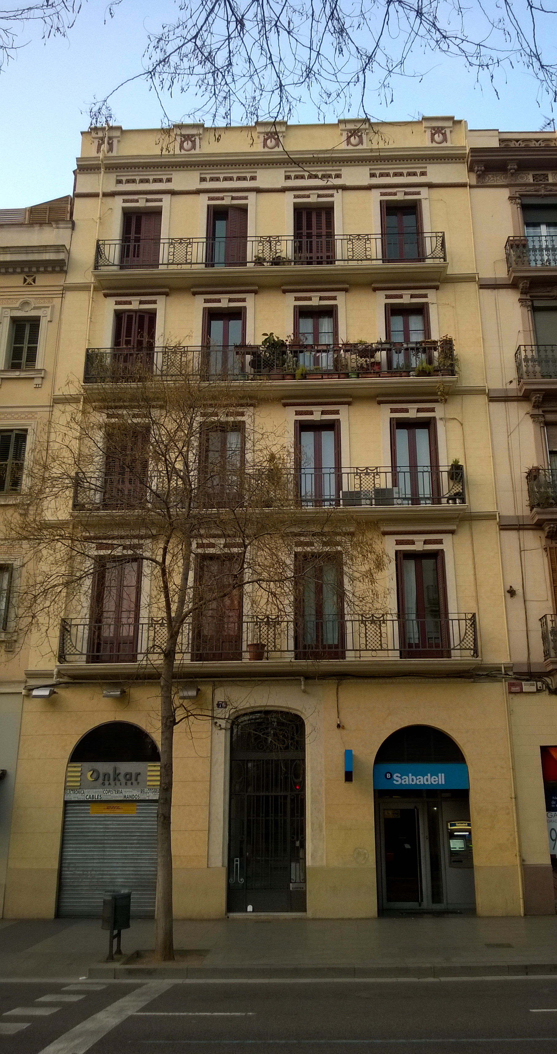 Modest Feu. Casa Juan Casas c/ Creu Coberta, 76